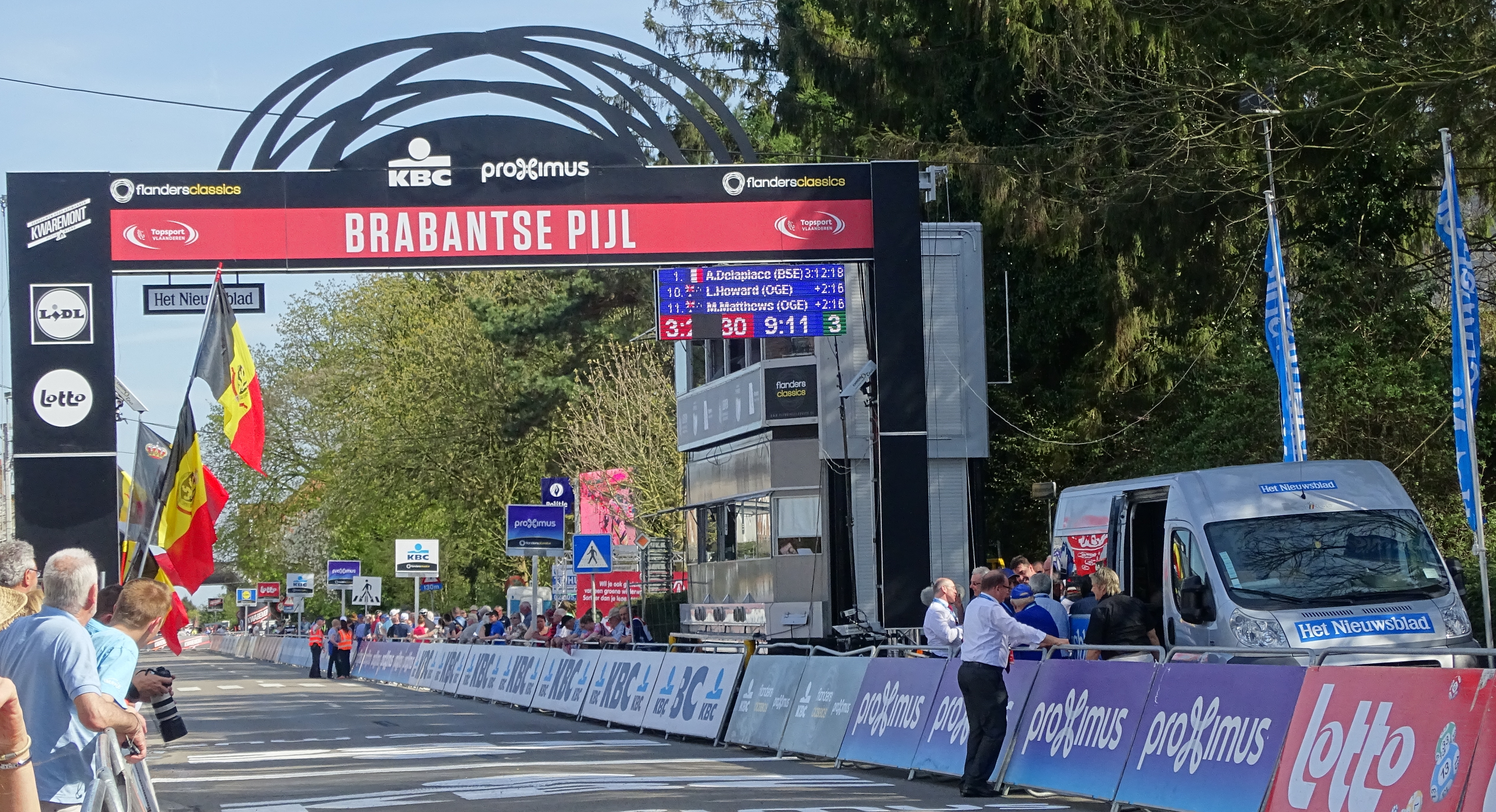 Reportage réalisé le mercredi 15 avril à l'occasion de l'arrivée de la Flèche brabançonne 2015 à Overijse, Belgique.